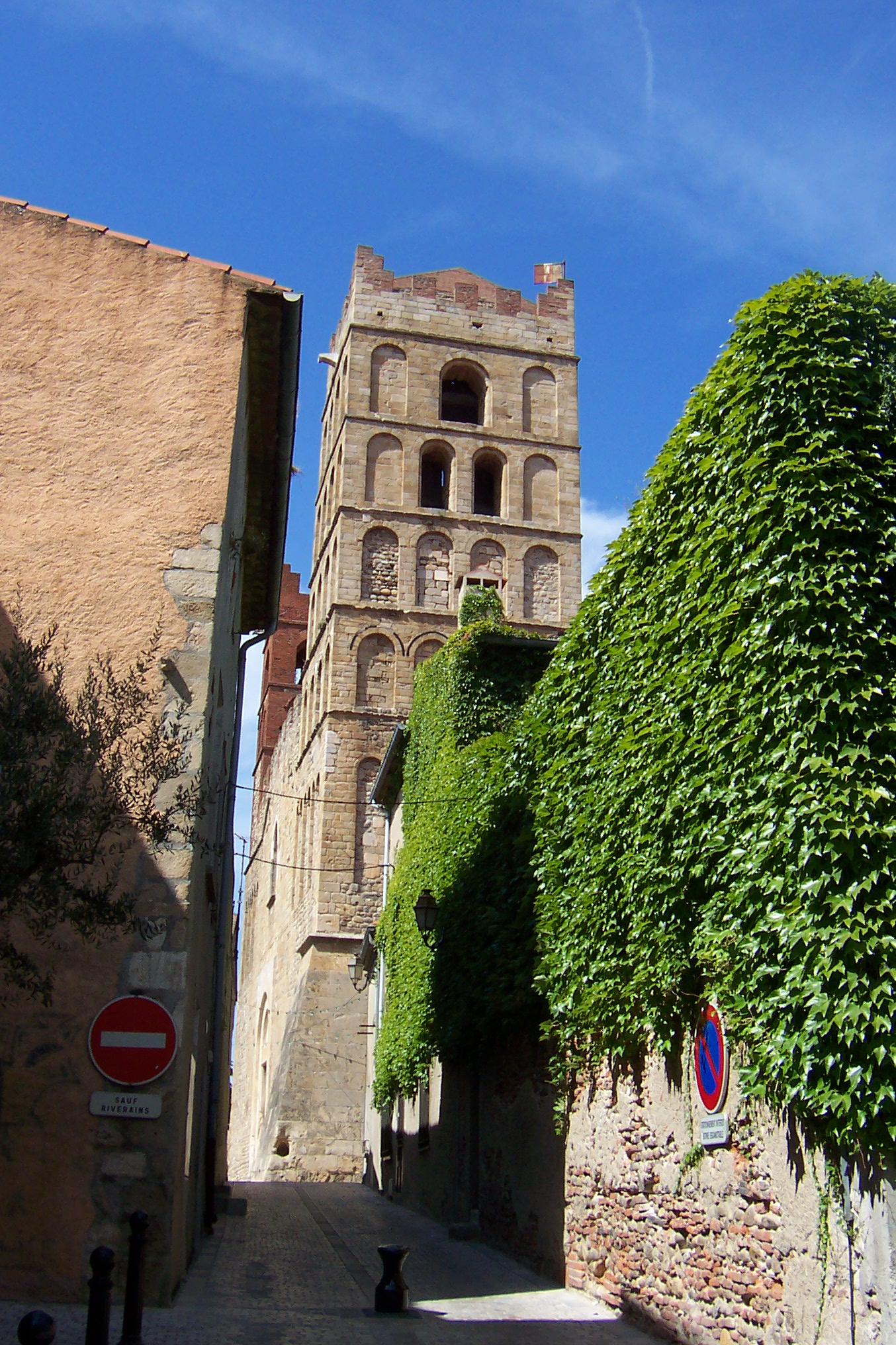 La catedral de Santa Eulàlia d'Elna es troba en el municipi francès d’Elna a la comarca del Rosselló, a la Catalunya Nord. Romànica dels segles XI - XIII amb elements gòtics. The north cloister in Elne (Southern France) Author : Radim Badsi